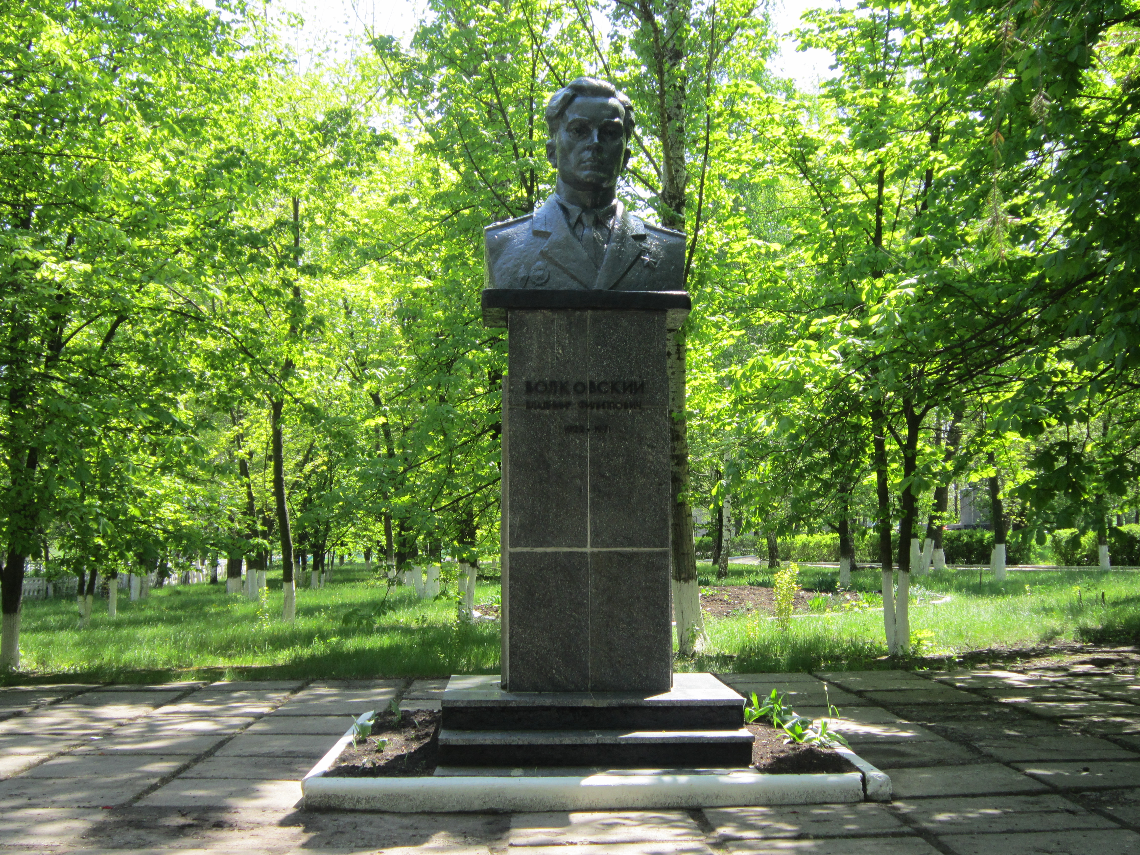 село Ржавчик. Бюст Волковського Володимира Филиповича.